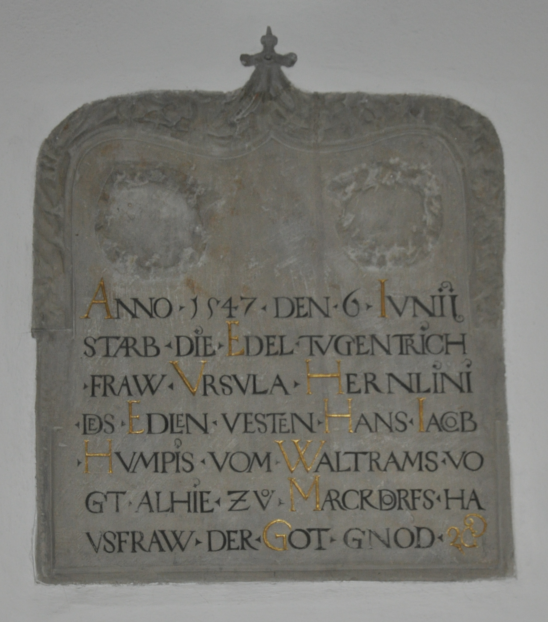 Kath. Pfarrkirche St. Nikolaus, Markdorf; Epitaph der Ursula Hernlin († 6.Juni 1547), Ehefrau des Vogts Hans Jacob Humpis von Waltrams